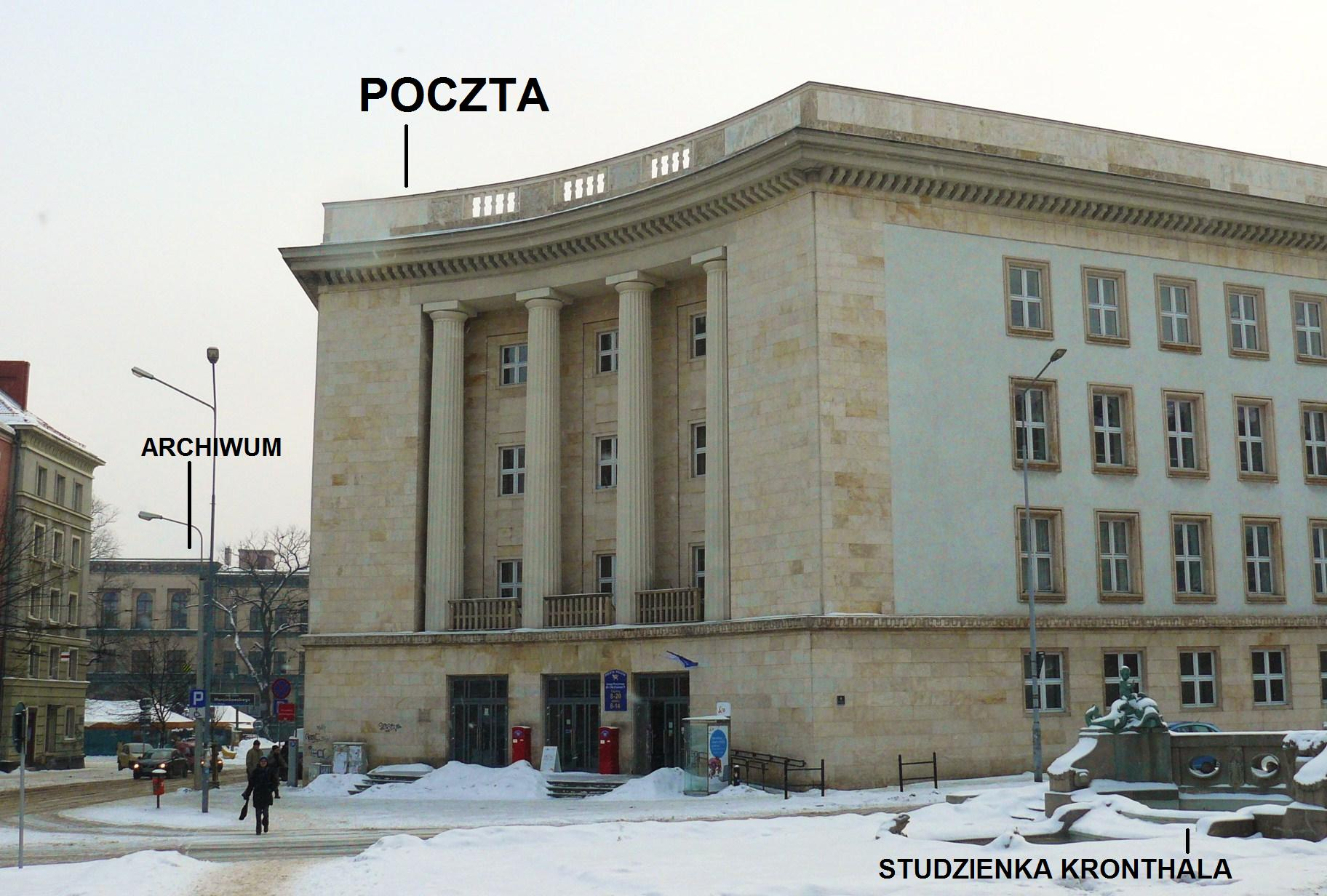 Post Office, Poznań, Marcinkowskiego Av. and Kronthal Well